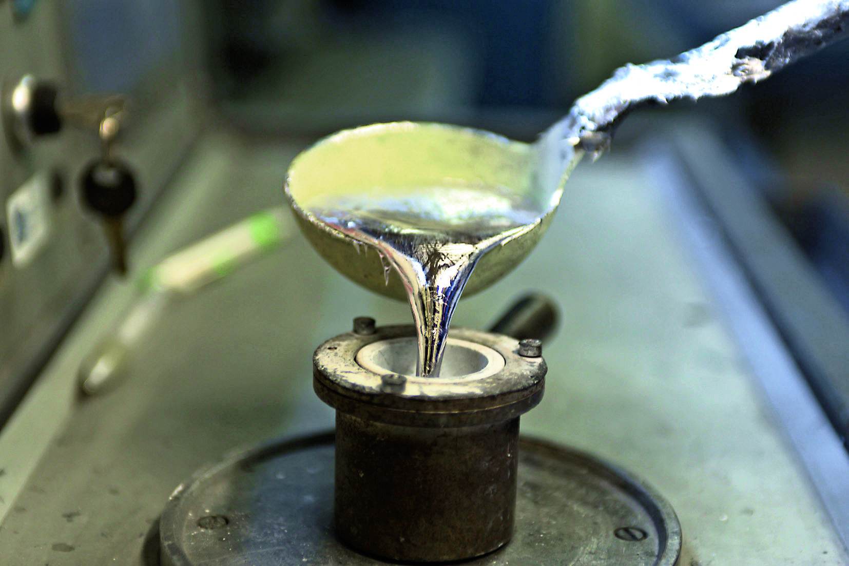 Materialprobe bei der Radherstellung.